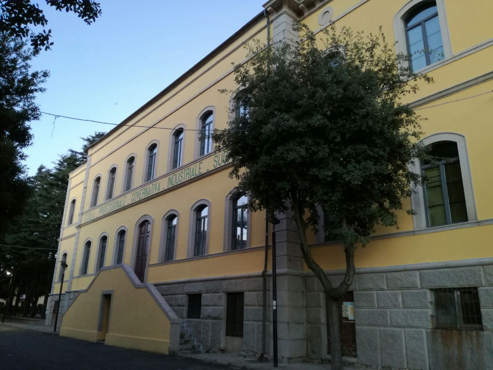 Il palazzo del vecchio Caseggiato delle scuole di Calangianus, sulla facciata laterale sinistra.